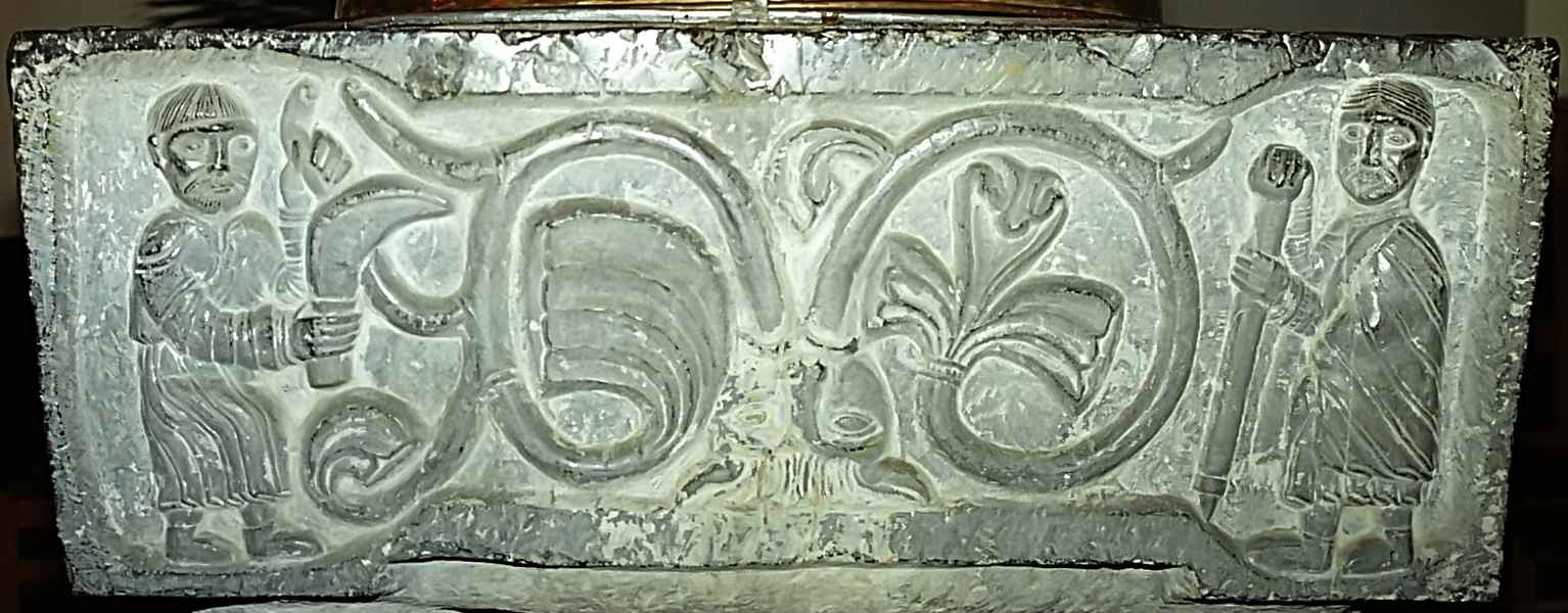 Belgique - Wallonie - Fonts baptismaux de Gentinnes